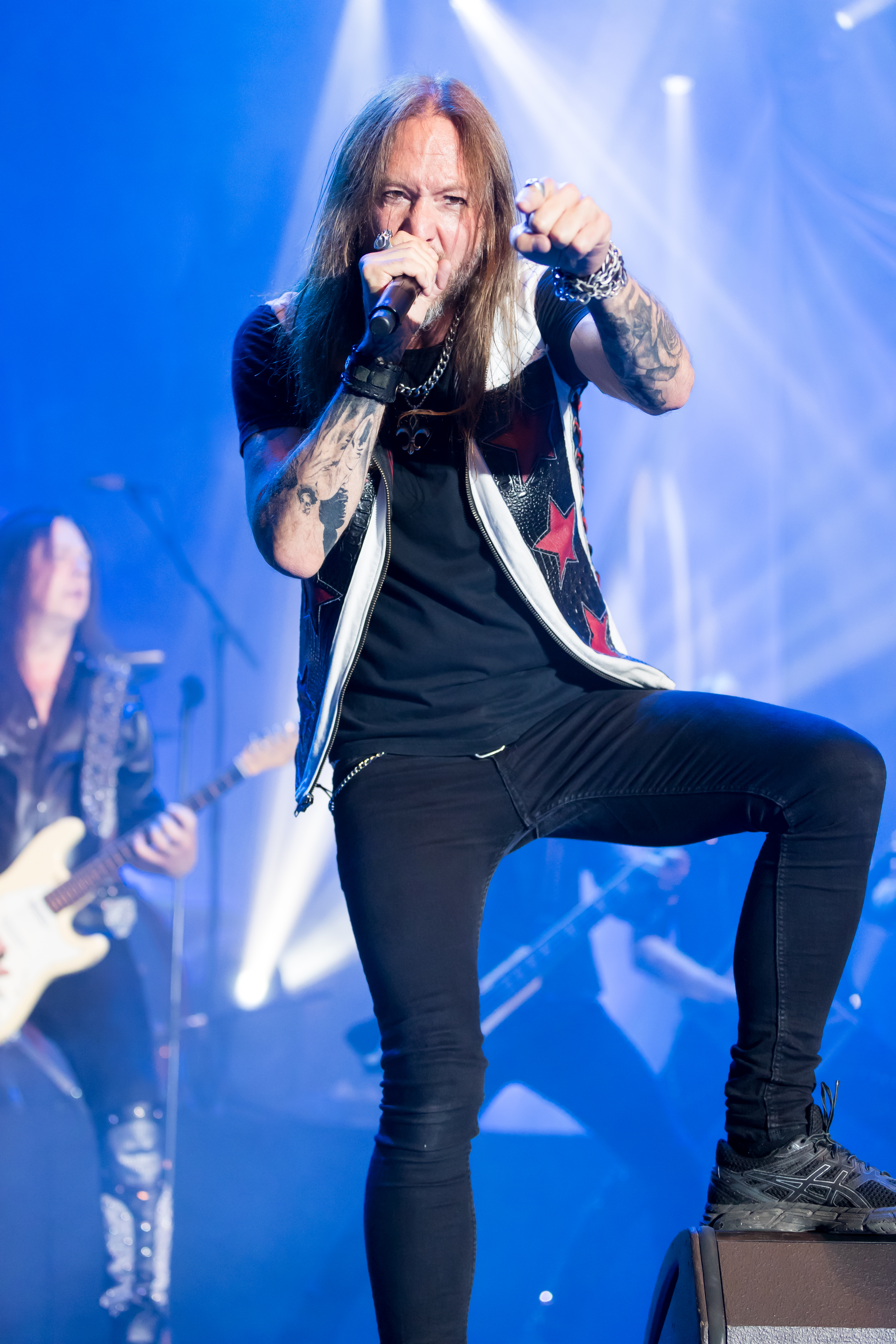 Hammerfall during Zeltfestival Rhein-Neckar at Maimarkt, Mannheim, Baden-Württemberg, Germany on 2017-06-24, Photo: Sven Mandel